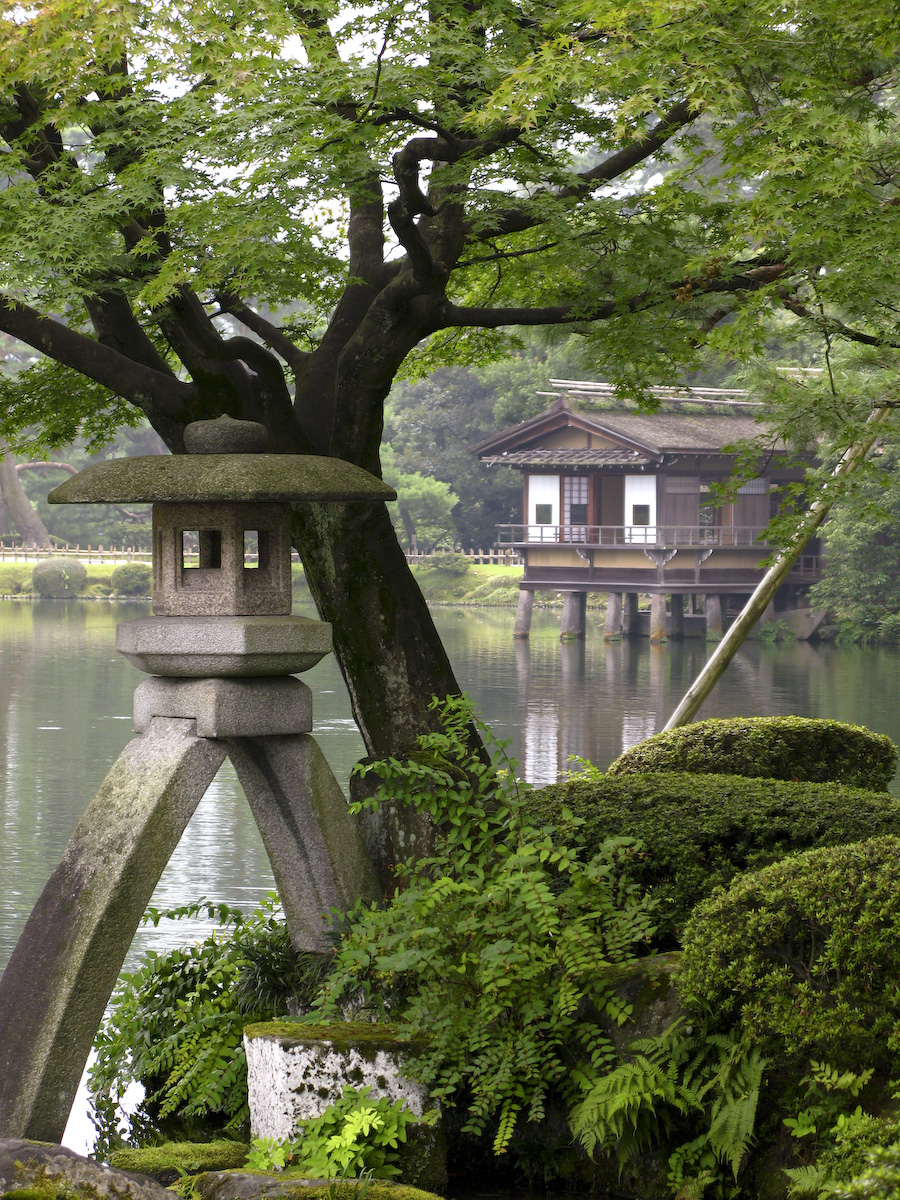 Kenroku-en, Kanazawa, Ishikawa Prefecture, Japan Kotoji Lantern